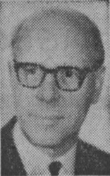 Arkitekten Simon Jensfelt